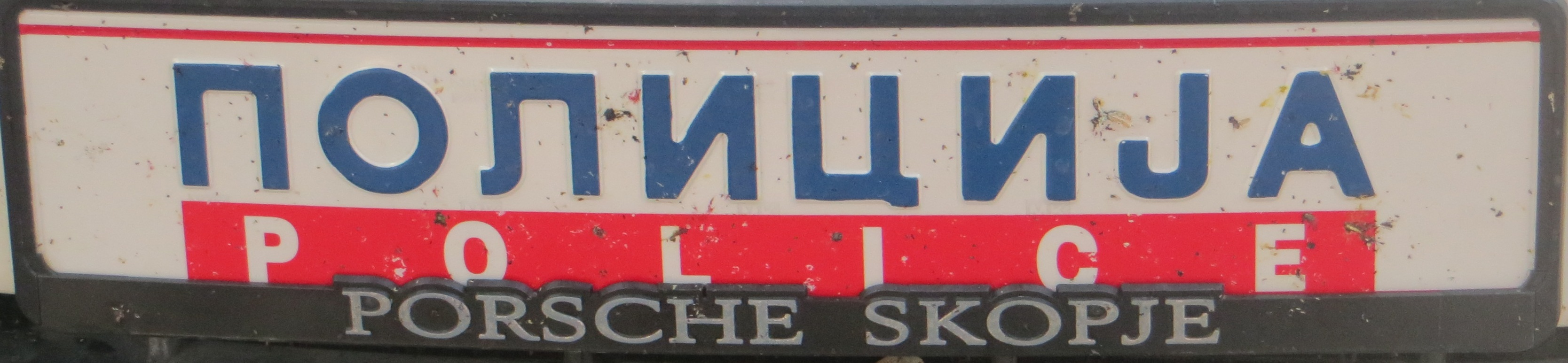 Voorklant politiekentekenplaat Macedonië